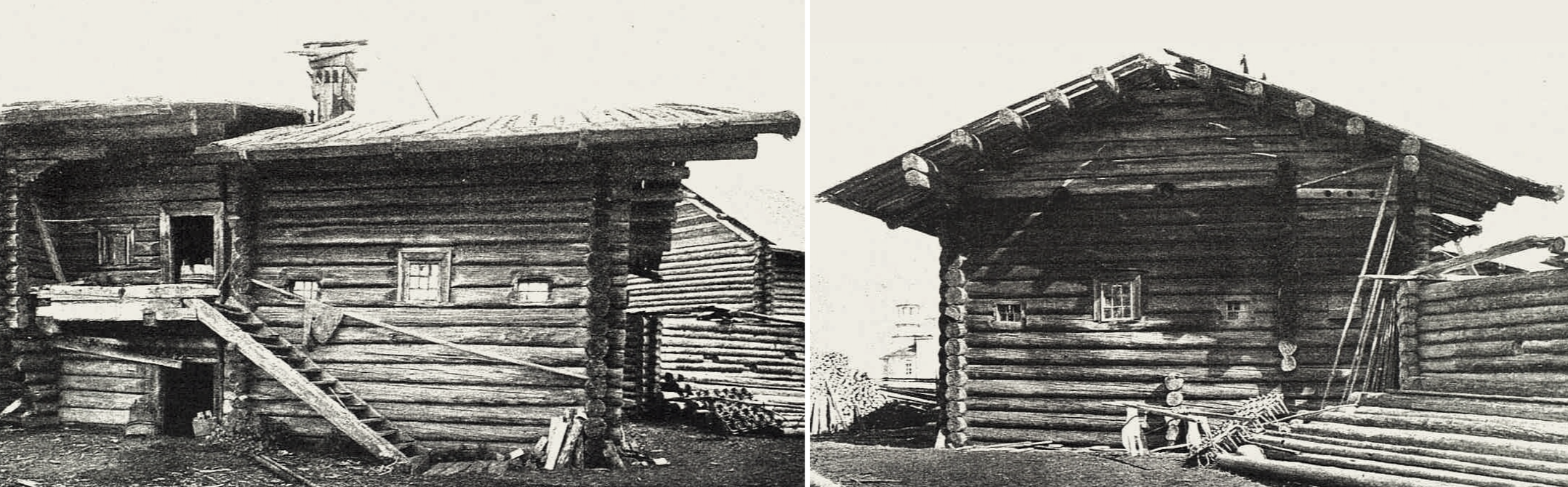 Изба Семи Государей — жилой дом, построенный в 1765 году в Архангельской губернии. Своё название получил за свой большой возраст